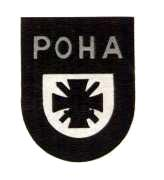 kaminski brigade patch